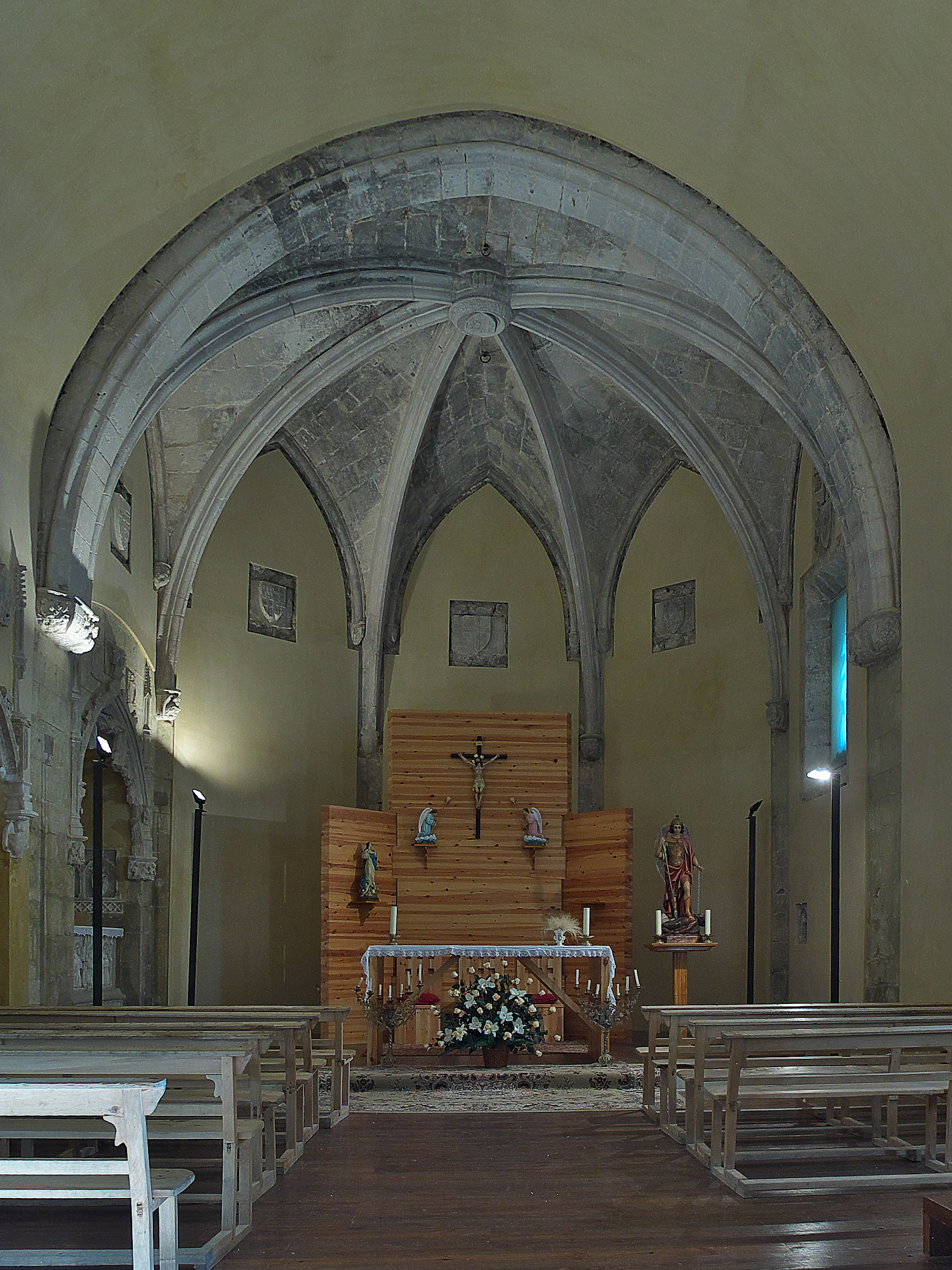 Presbiterio de la iglesia (h. 1414). Iglesia gótica probablemente promoviada por Gonzalo de Funes para su panteón.